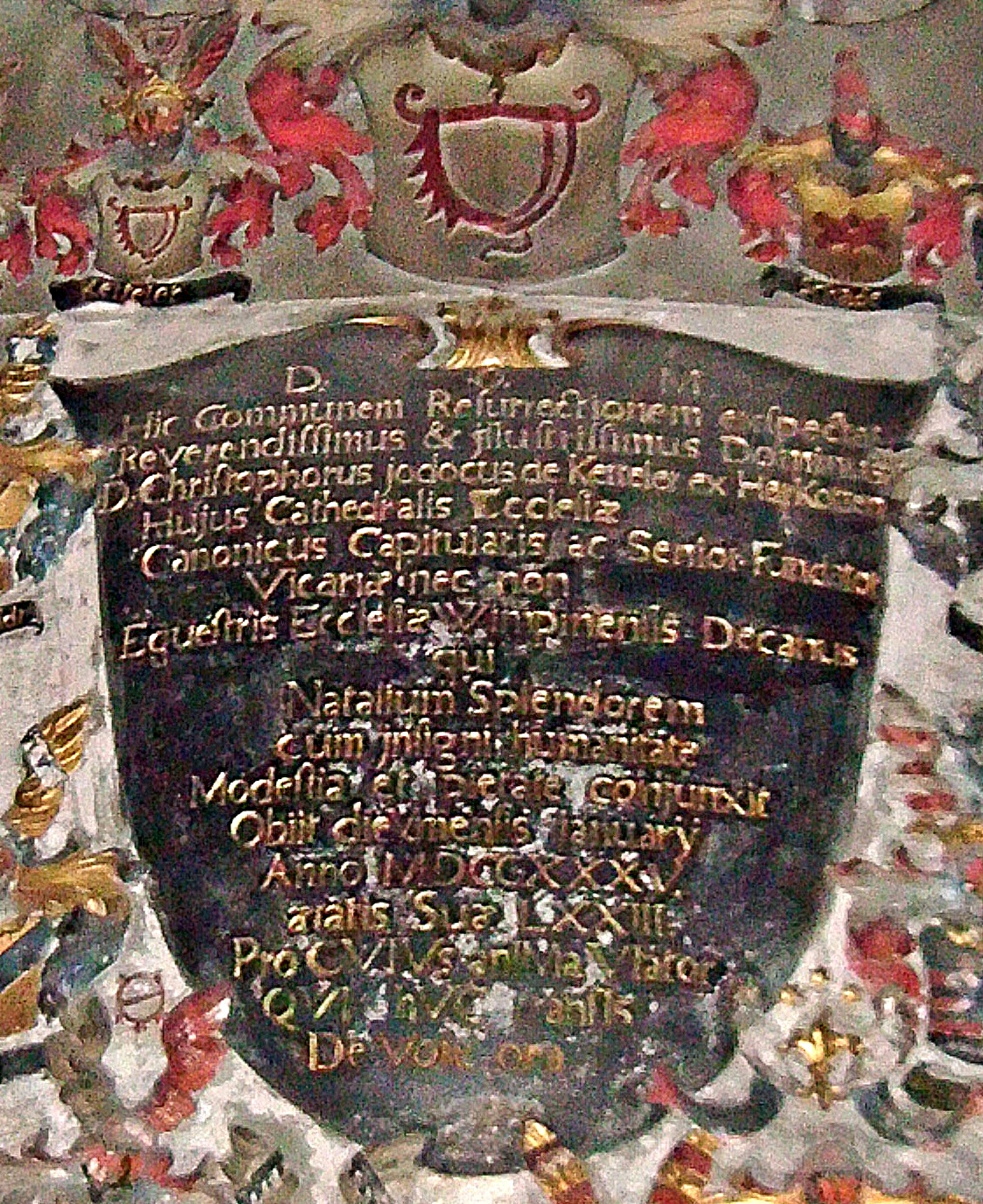 Inschrift vom Epitaph des Wormser Domherren und Wimpfener Stiftsdekans Christoph Jodokus von Ketteler-Harkotten (+ 1735), Dom zu Worms, südliches Querschiff